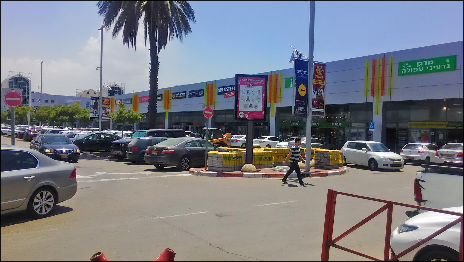 פאוור סנטר בנשר